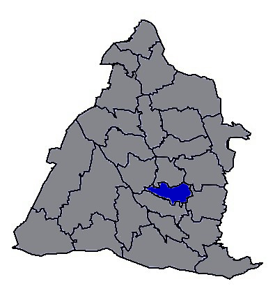 臺灣省彰化縣永靖鄉。